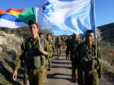 גדוד חרב.